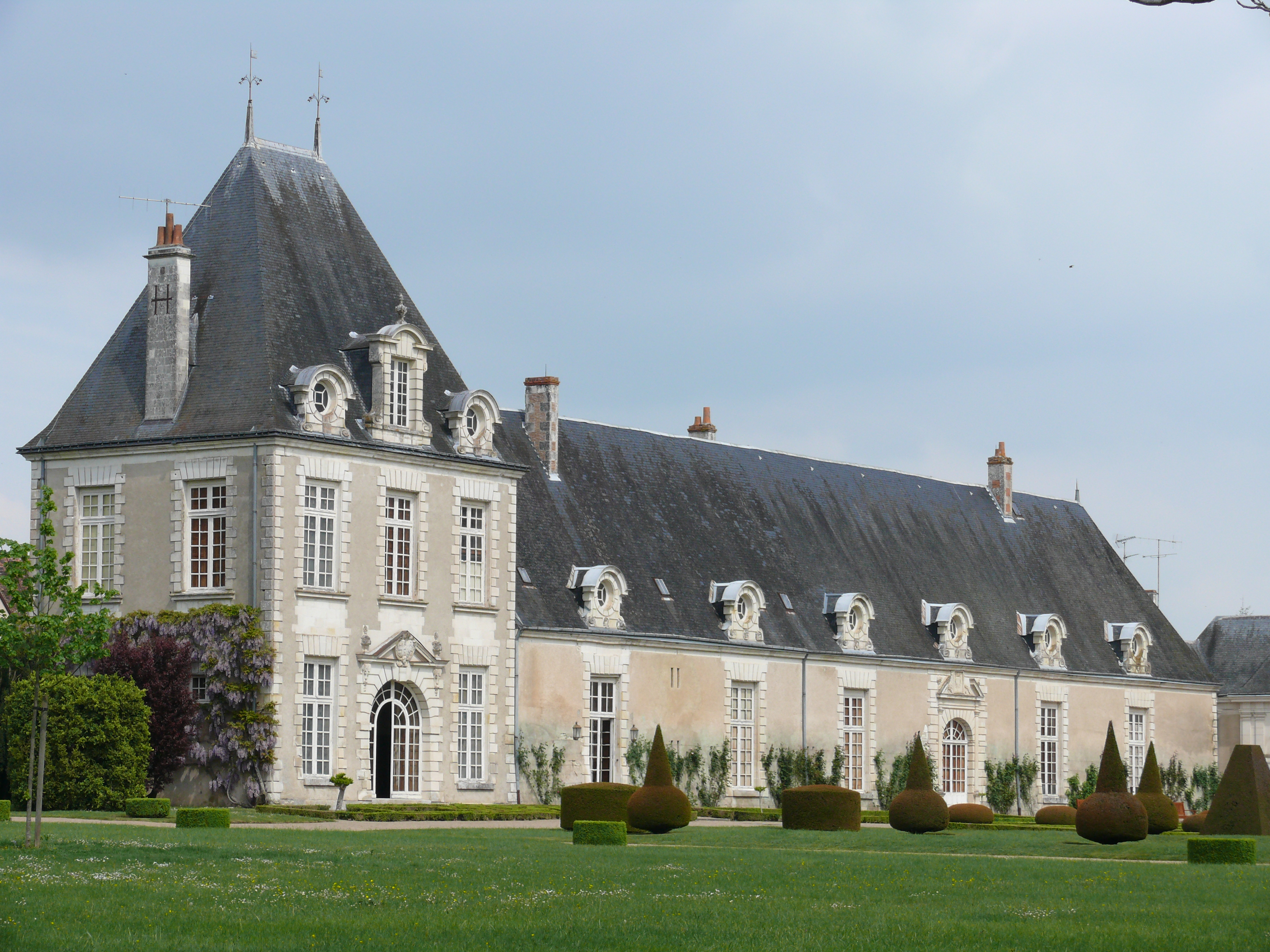 Château d'Azay-le-Ferron - Aile